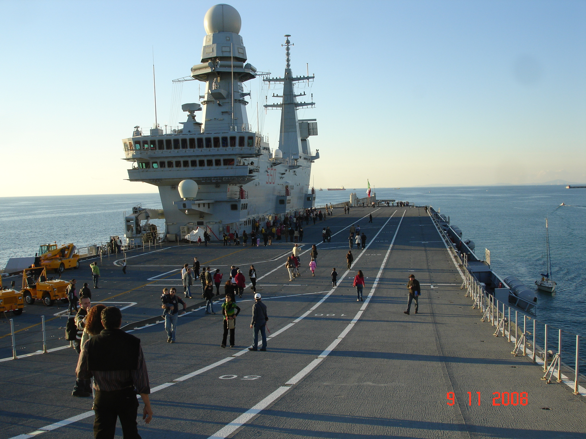 il ponte della portaerei Cavour